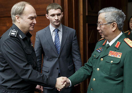 Заместитель Министра обороны Российской Федерации Анатолий Антонов встретился со своим вьетнамским коллегой Нгуен Тьи Винем